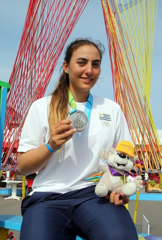 Lola con la medalla de plata